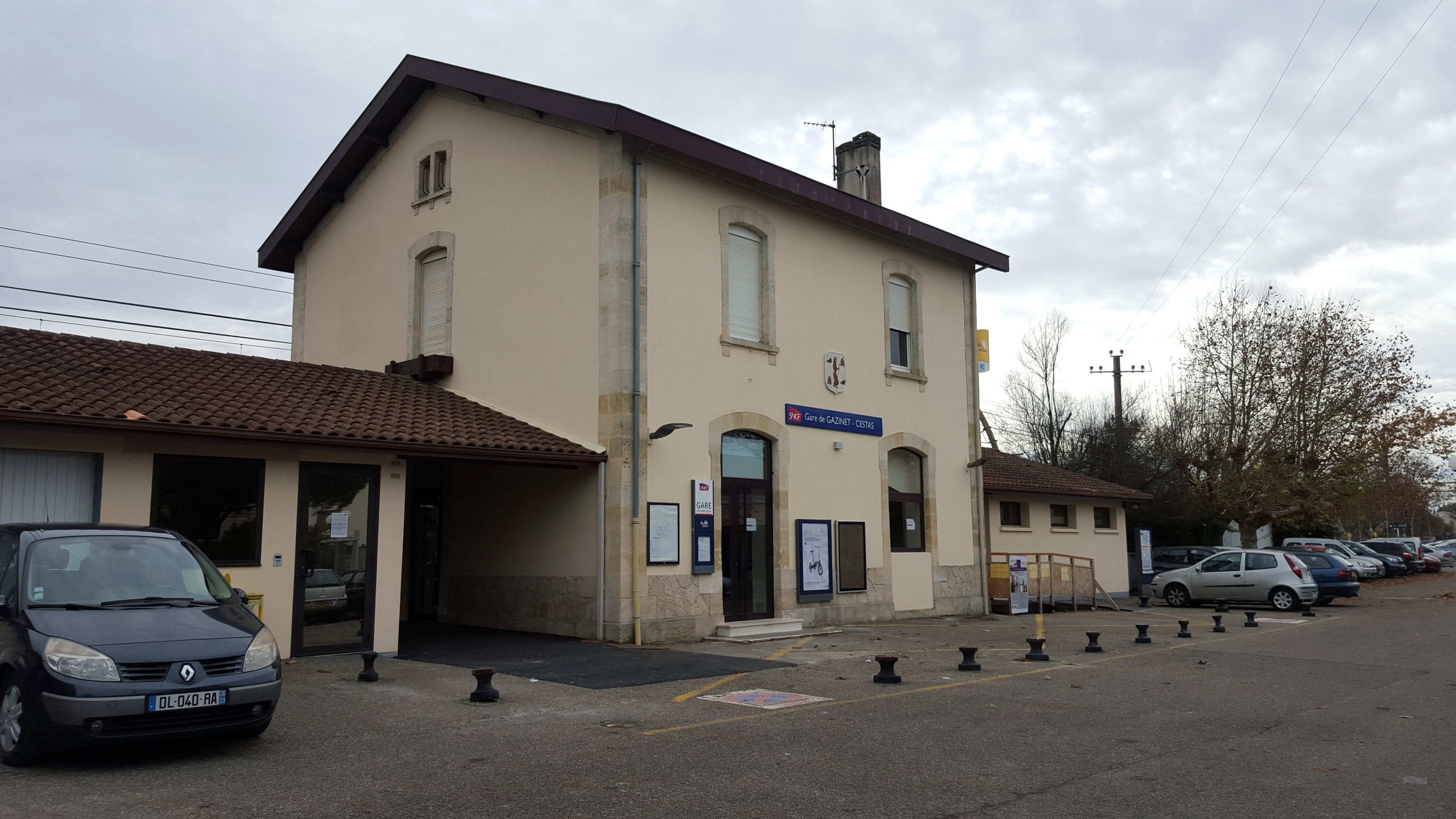 Vue du bâtiment voyageurs, côté rue, de la gare SNCF de Gazinet-Cestas.